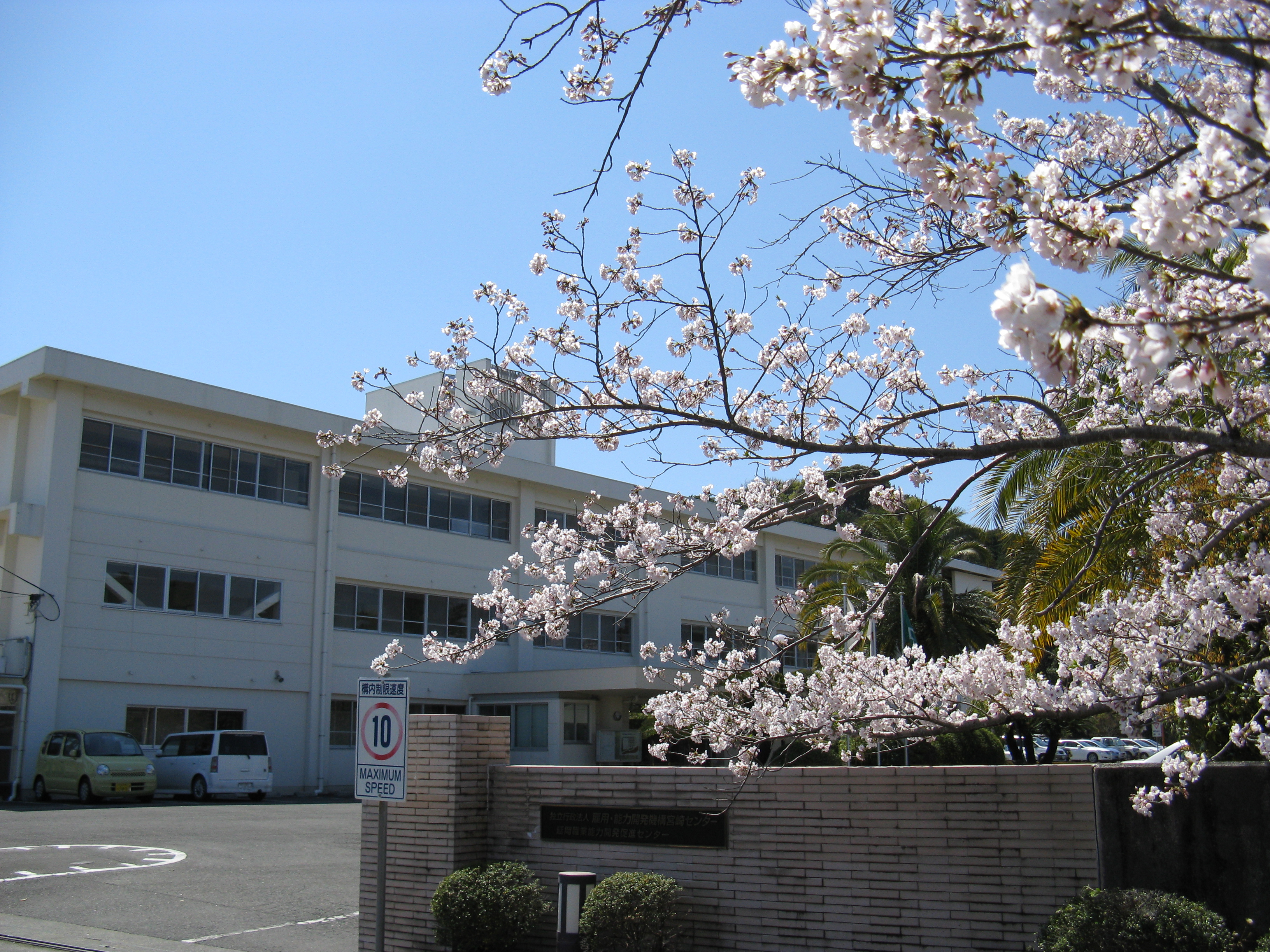 独立行政法人 雇用・能力開発機構 宮崎センター 延岡職業能力開発促進センター